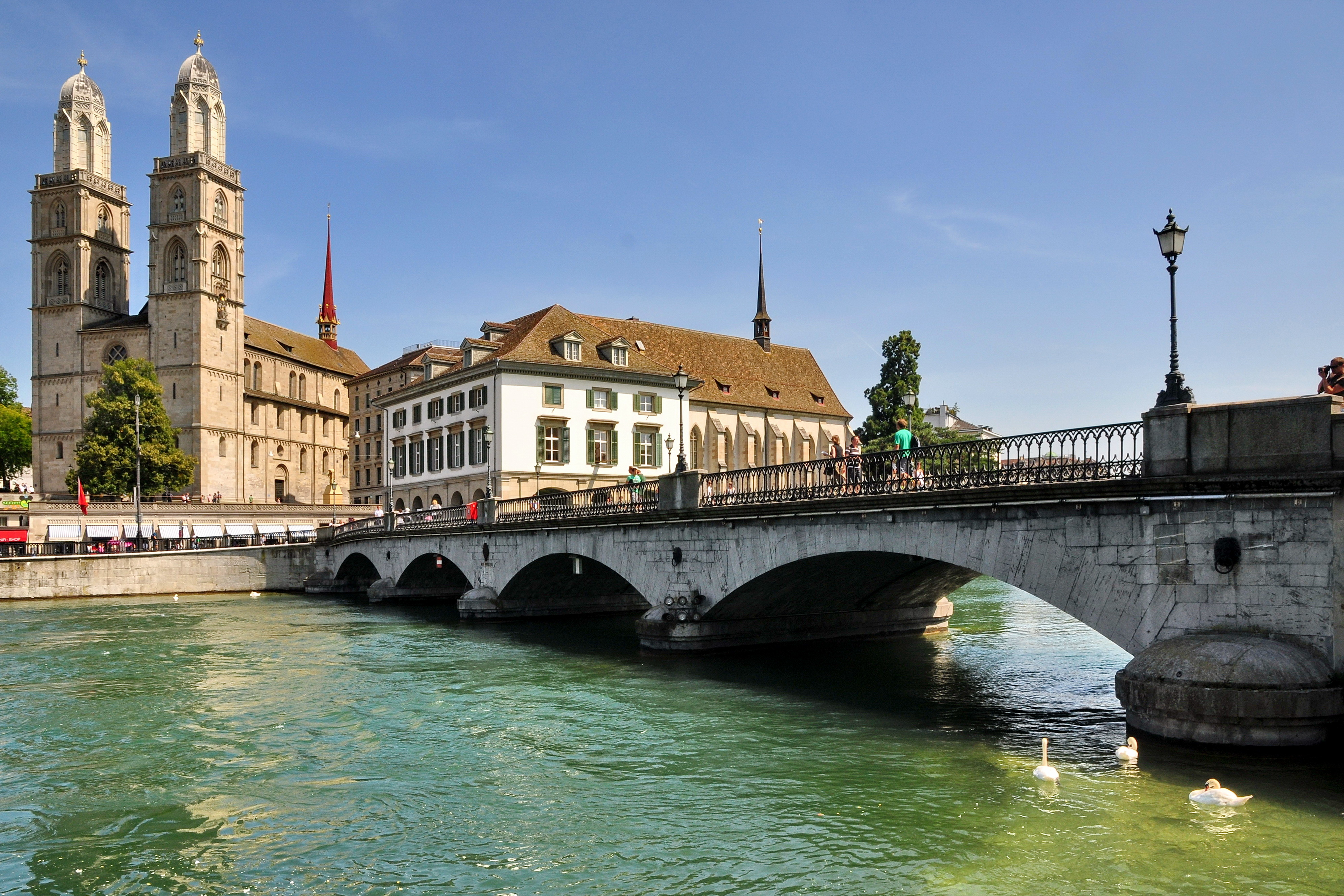 Grossmünster and Helmhaus-Wasserkirchea t Limmatquai in Zürich (Switzerland), as seen from Wühre between Münsterhof and Weinplatz, Münsterbrücke in the foreground.